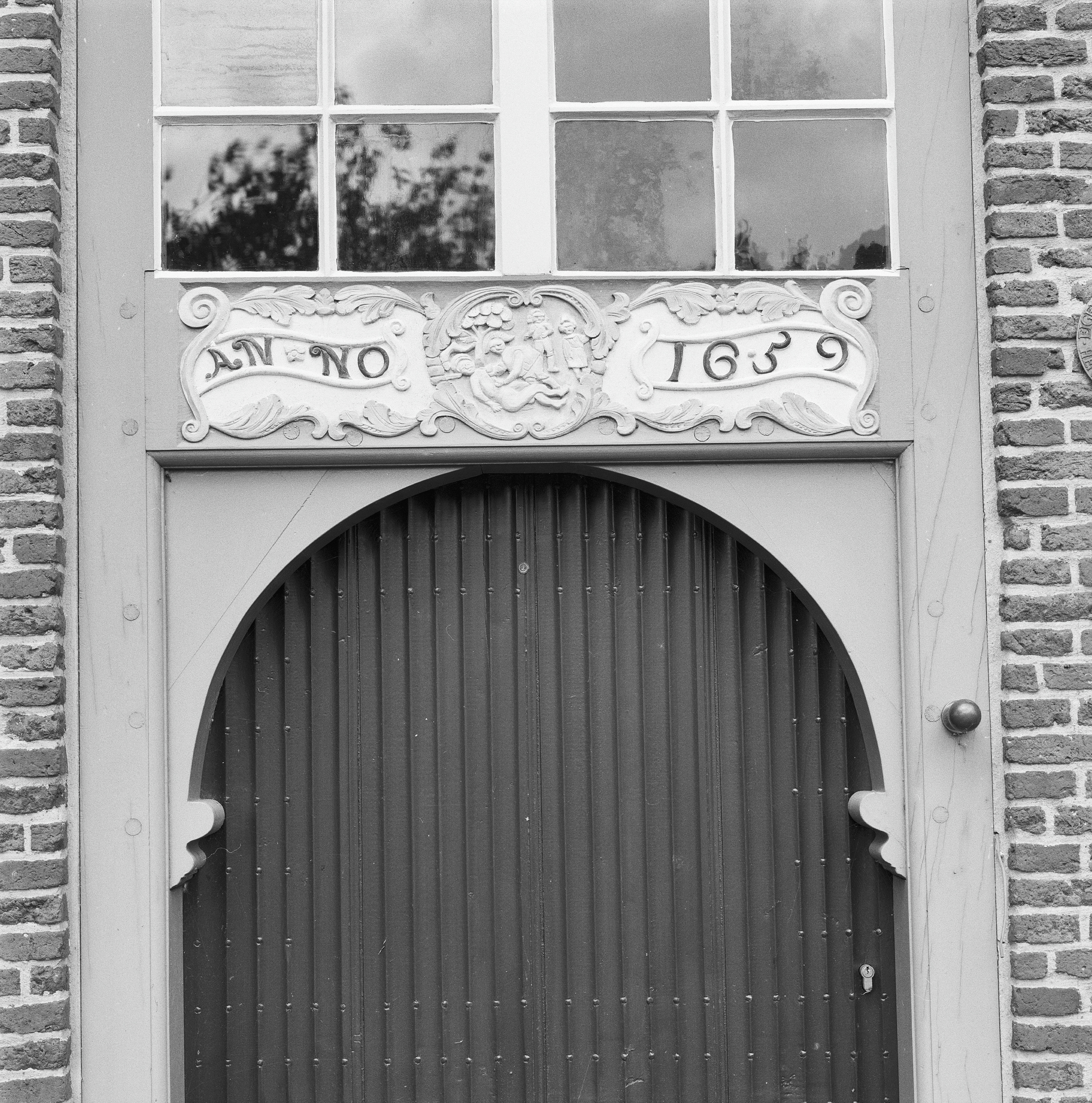 DE BARMHARTIGE SAMARITAAN: Exterieur DEURKALF